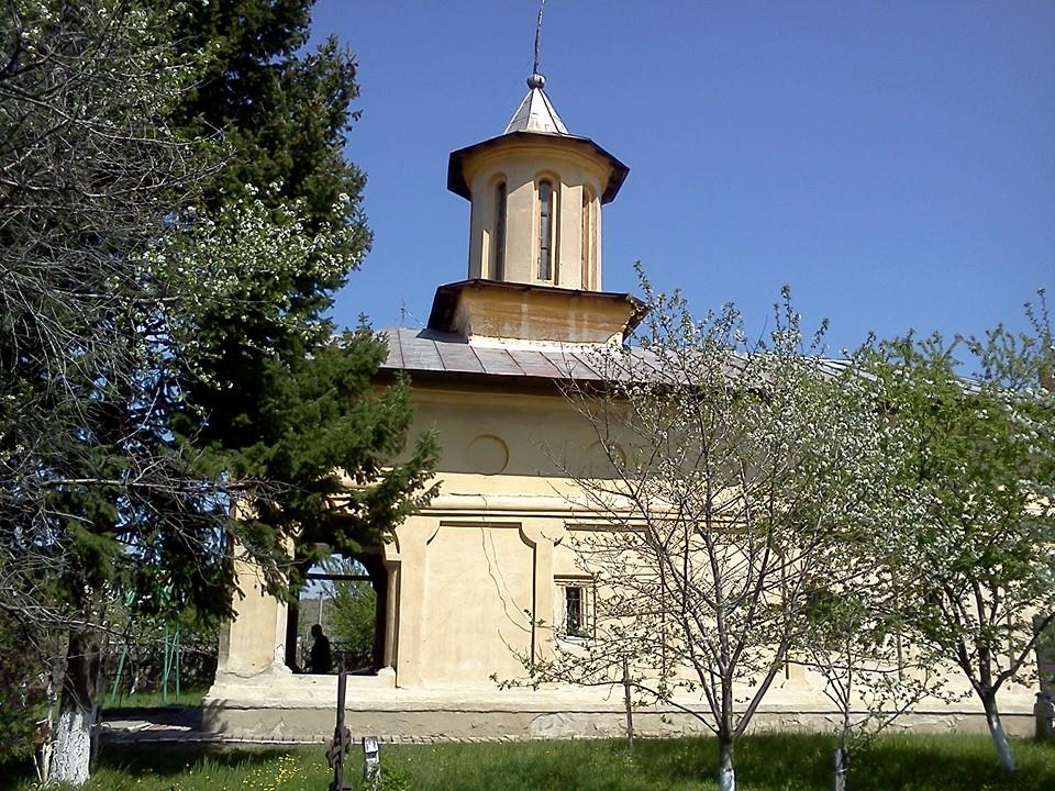 Biserica „Sf. Stelian” 01